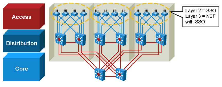 Монгол: йцужэ